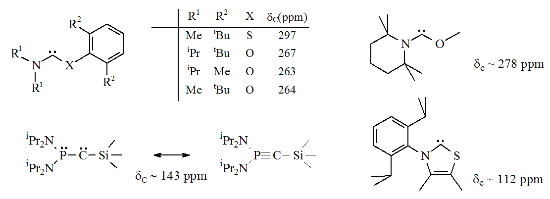 Heteroaminocarbenes